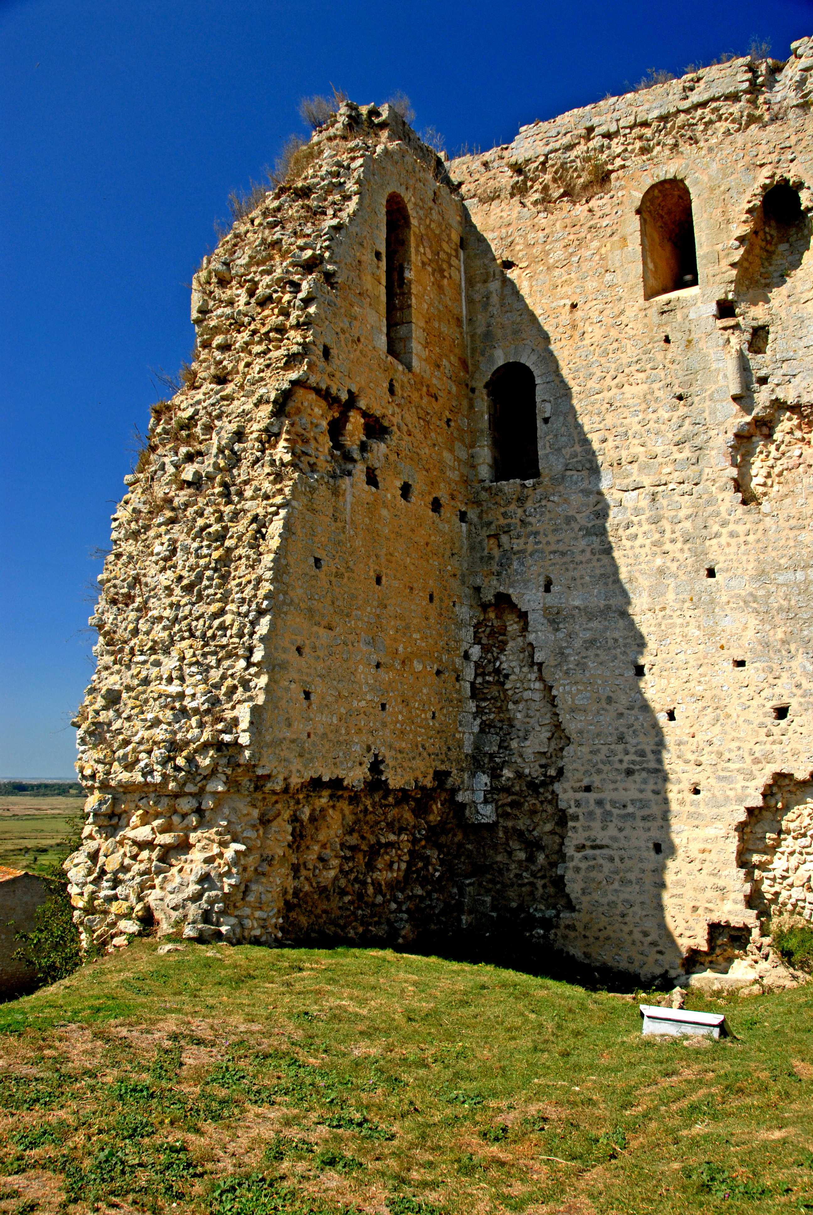 Tour-de-Broe, südliche Innenecke